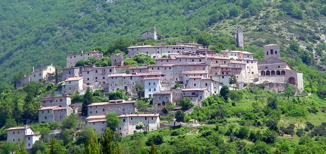 Panoramica di Campi Alto